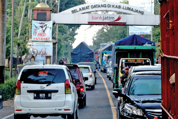 Jalur utama yang menghubungkan Lumajang-Probolinggo lumpuh total